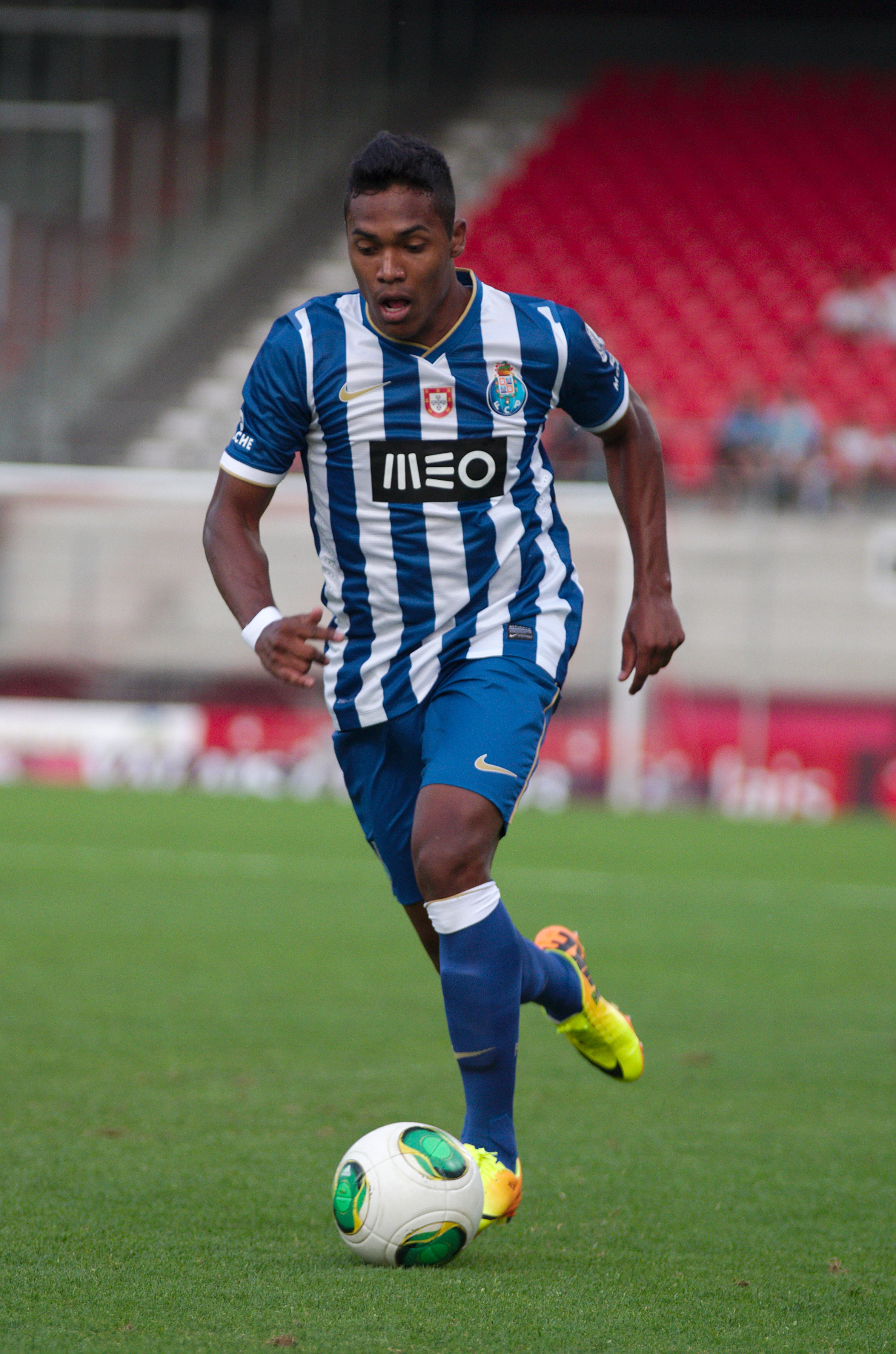 Valais Cup 2013 - OM-FC Porto - 20130713 - Alex Sandro